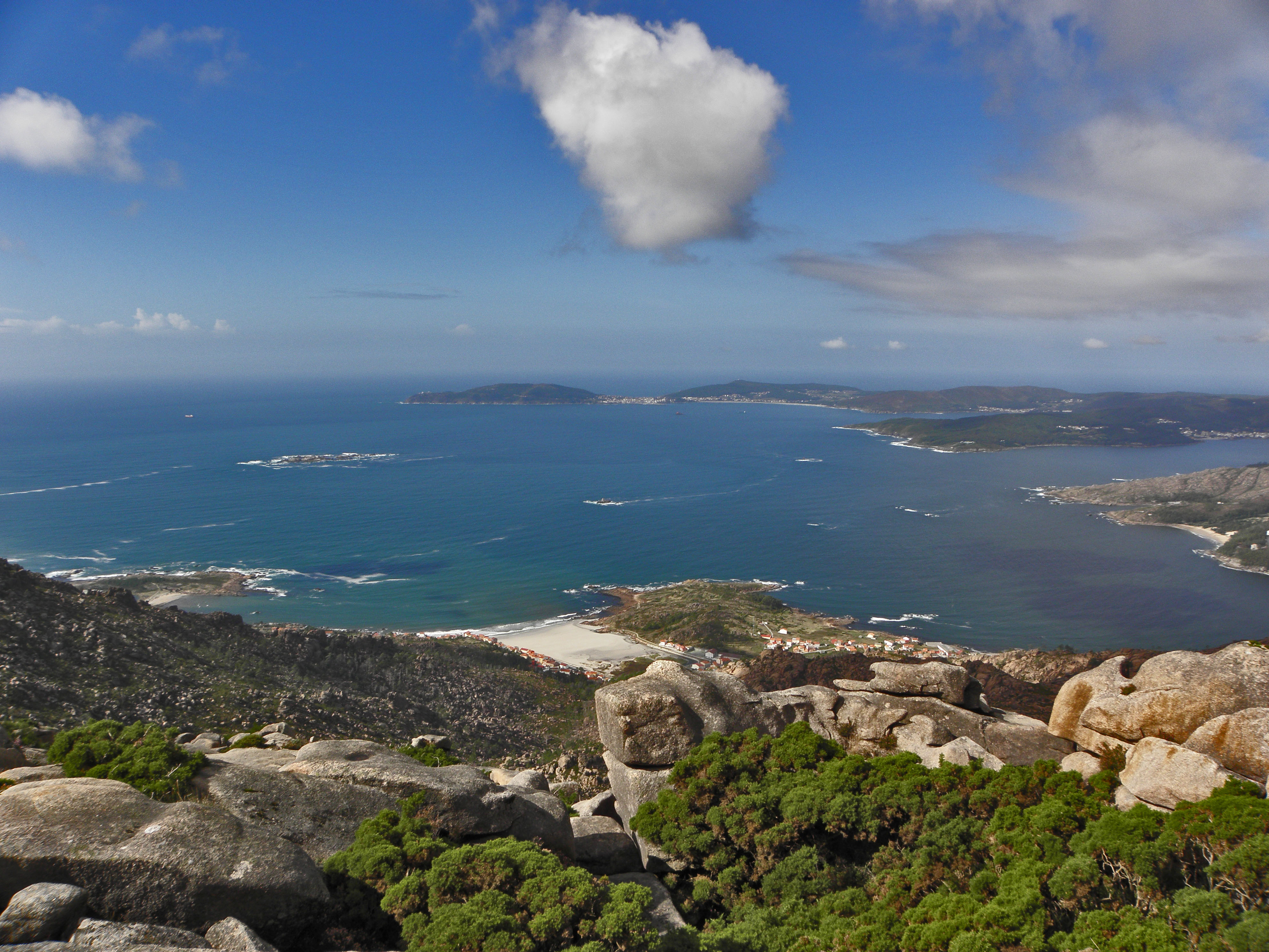 Cabo Fisterra dende o Monte Pindo